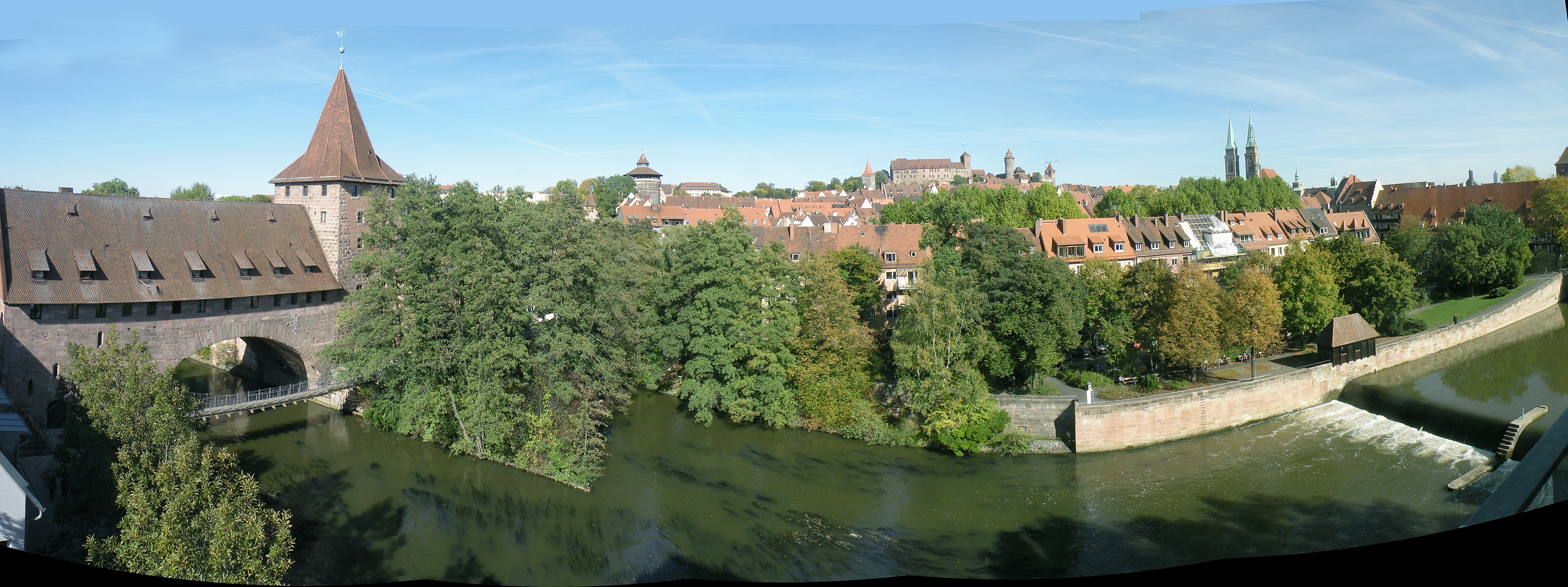 Nuremberg.Pegnitz,hahged bridge and Burg.jpg